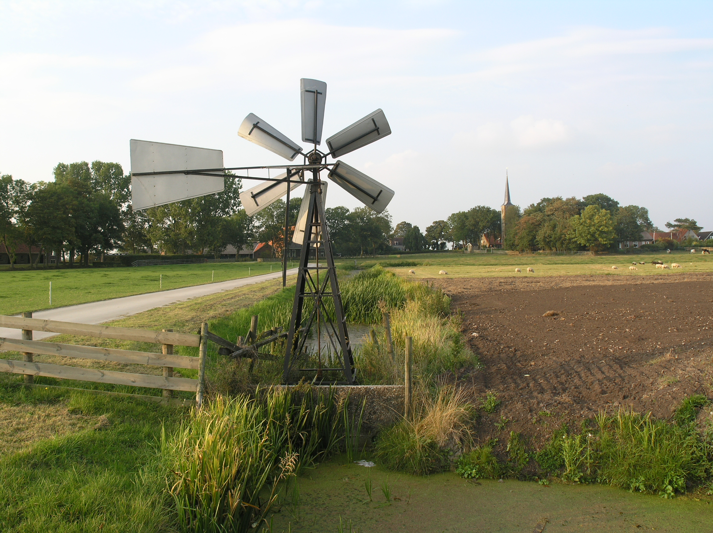 Weidum kleine windmotor Weidum